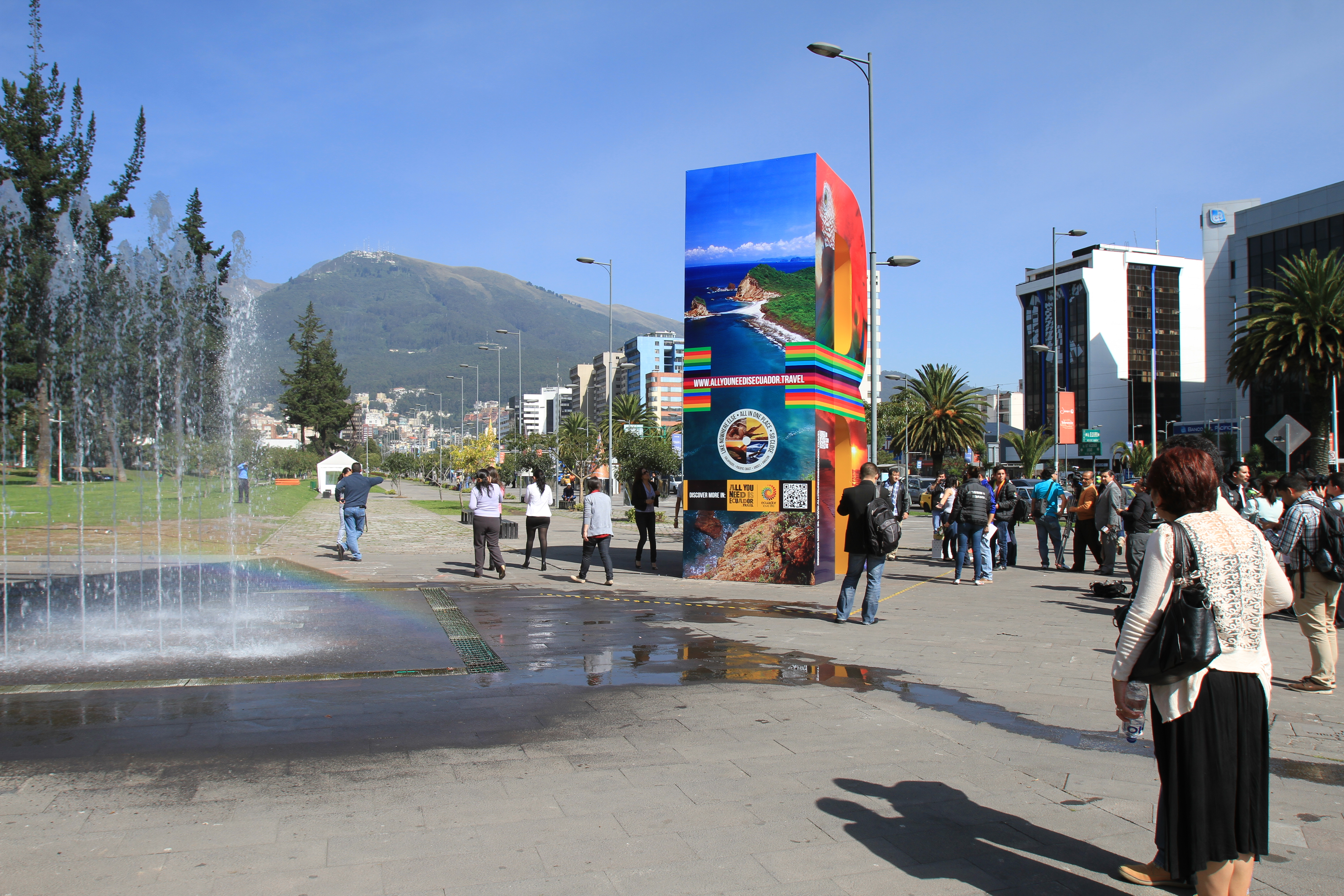 Campaña mundial AllYouNeedIsEcuador 2014